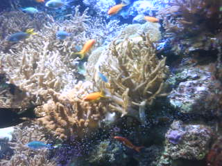 Fiskar